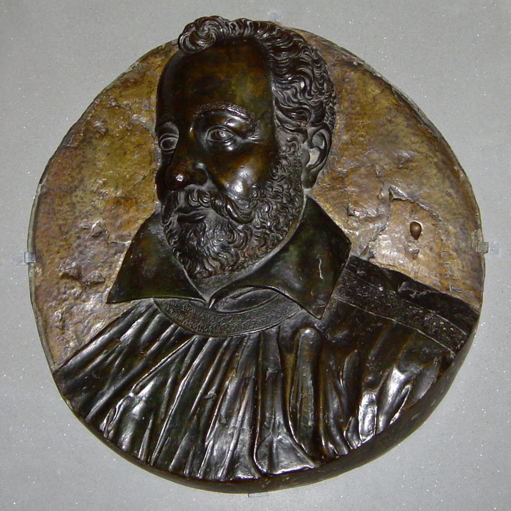 le poète Philippe Desportes, médaillon provenant de son tombeau en l'abbaye normande de Bonport, dont il était abbé commendataire.